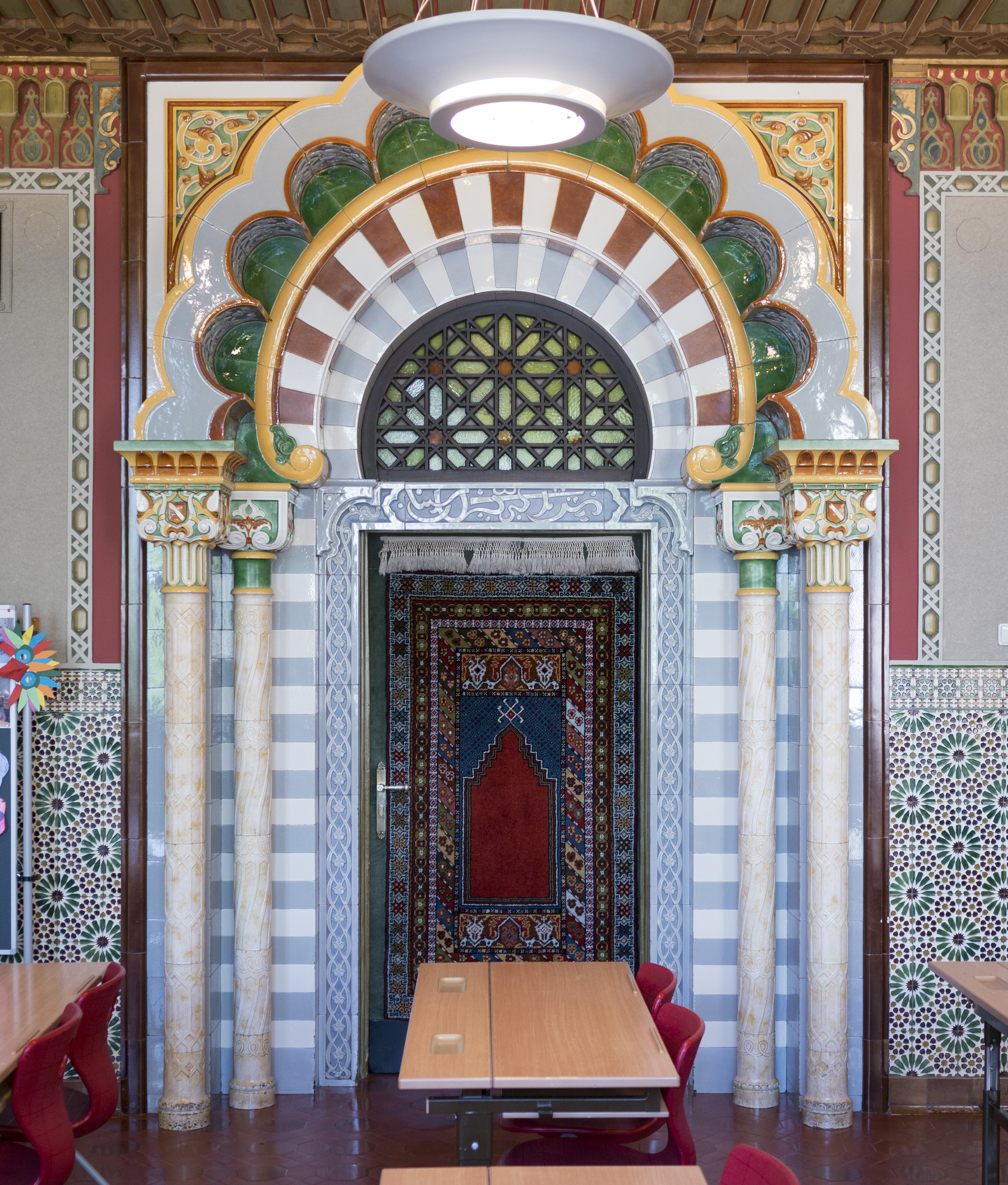 Berndorfer Stilklassen Maurisches Zimmer Portal